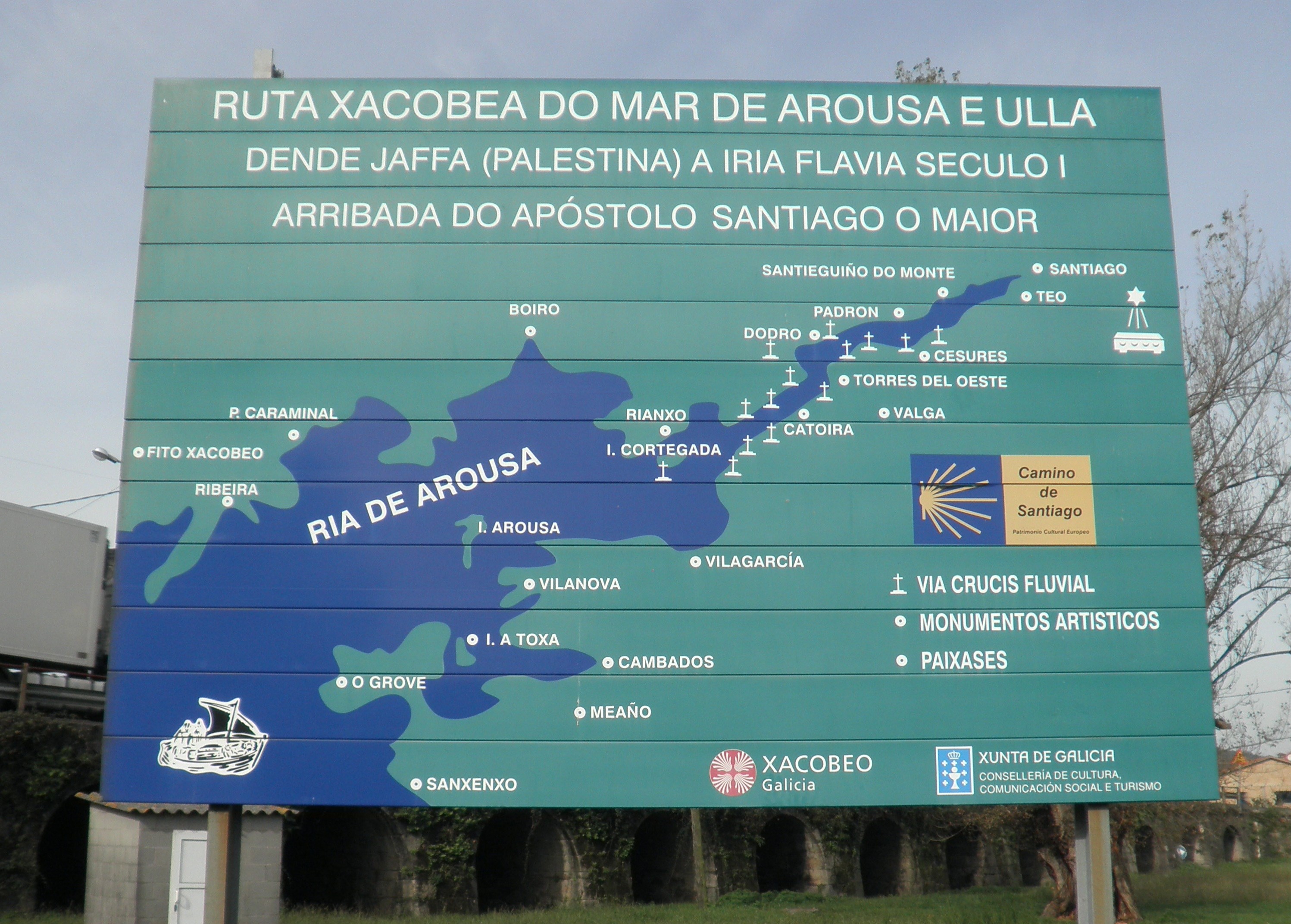 Letreiro co plano da Ruta Xacobea do Mar de Arousa e Ulla